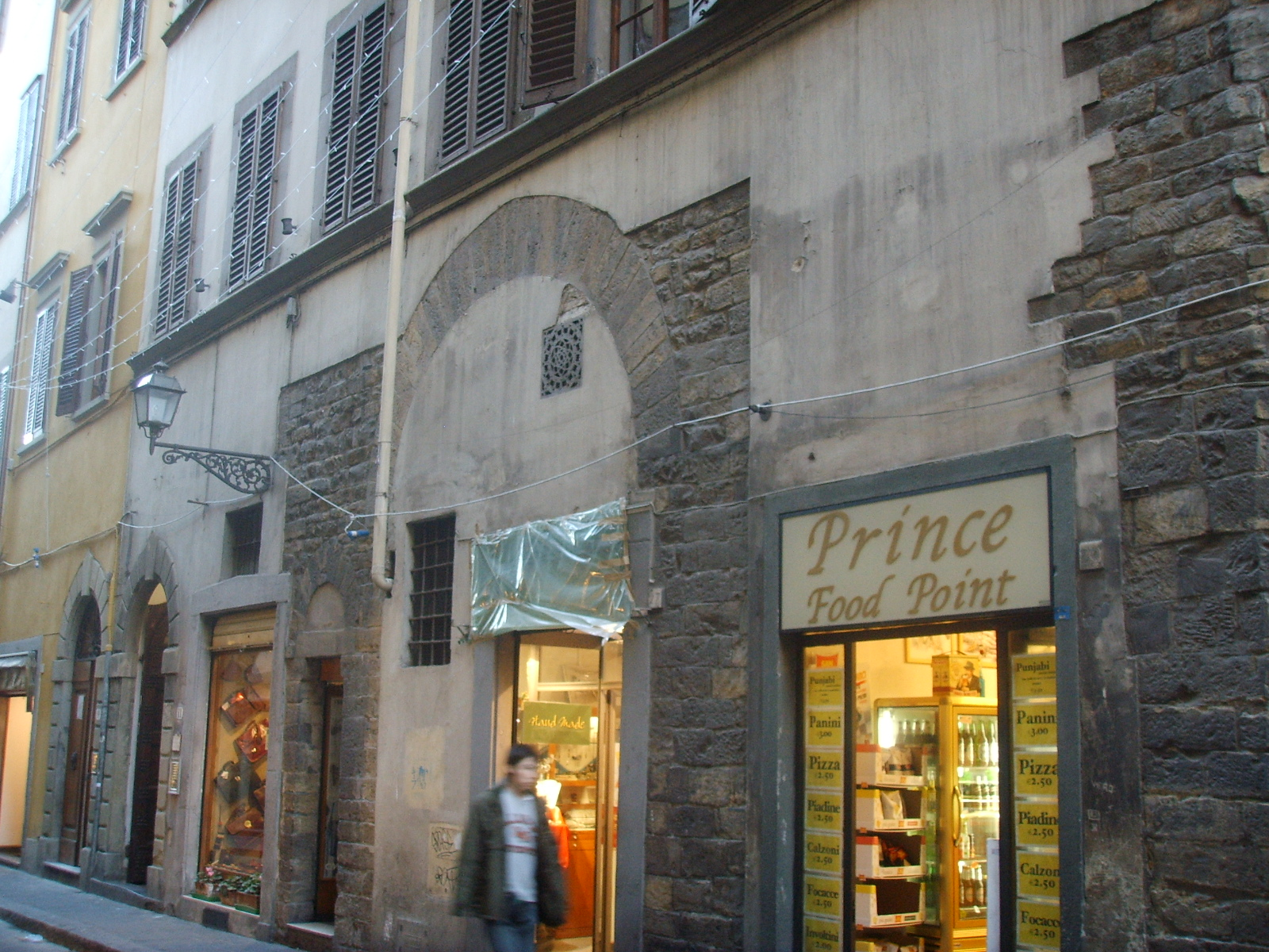 Torre_dei_Bagnesi in Florence, Italy